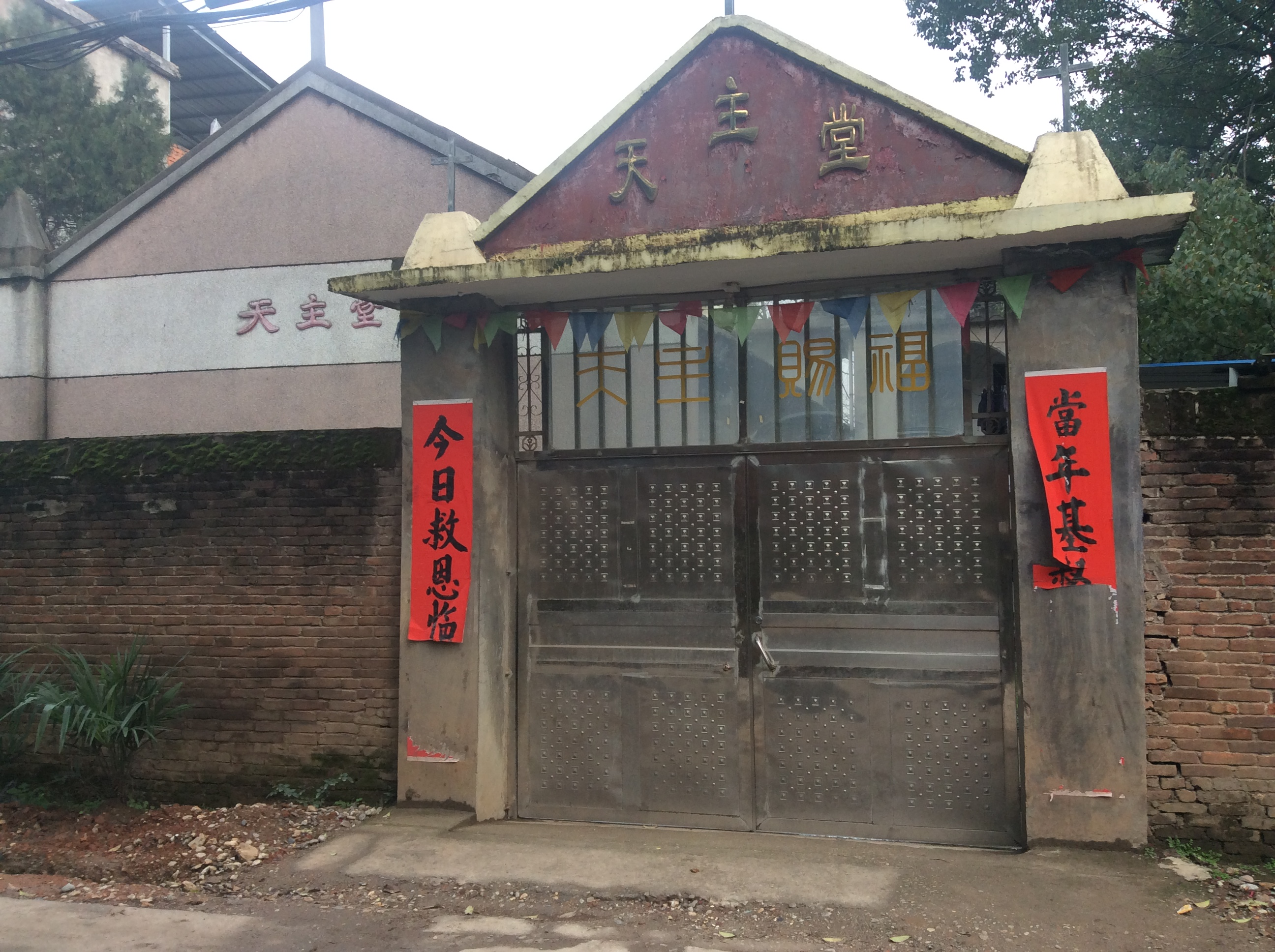 罗家湾天主堂现址